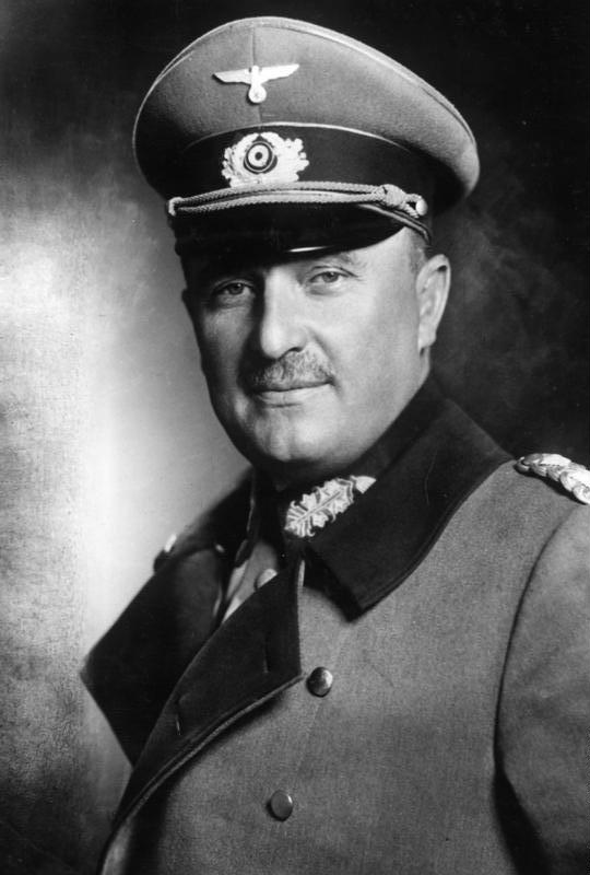 Karl Becker ADN-Zentralbild-Archiv Prof. Dr. phil. h. c. Dr. Ing. Karl Becker, General der Artillerie, Präsident des Forschungsrates des faschistischen Deutschlands. 23.3.1937 [Scherl Bilderdienst] Abgebildete Personen: Becker, Karl Prof. Dr. Dr.: General, Chef des Heereswaffenamtes, Deutschland